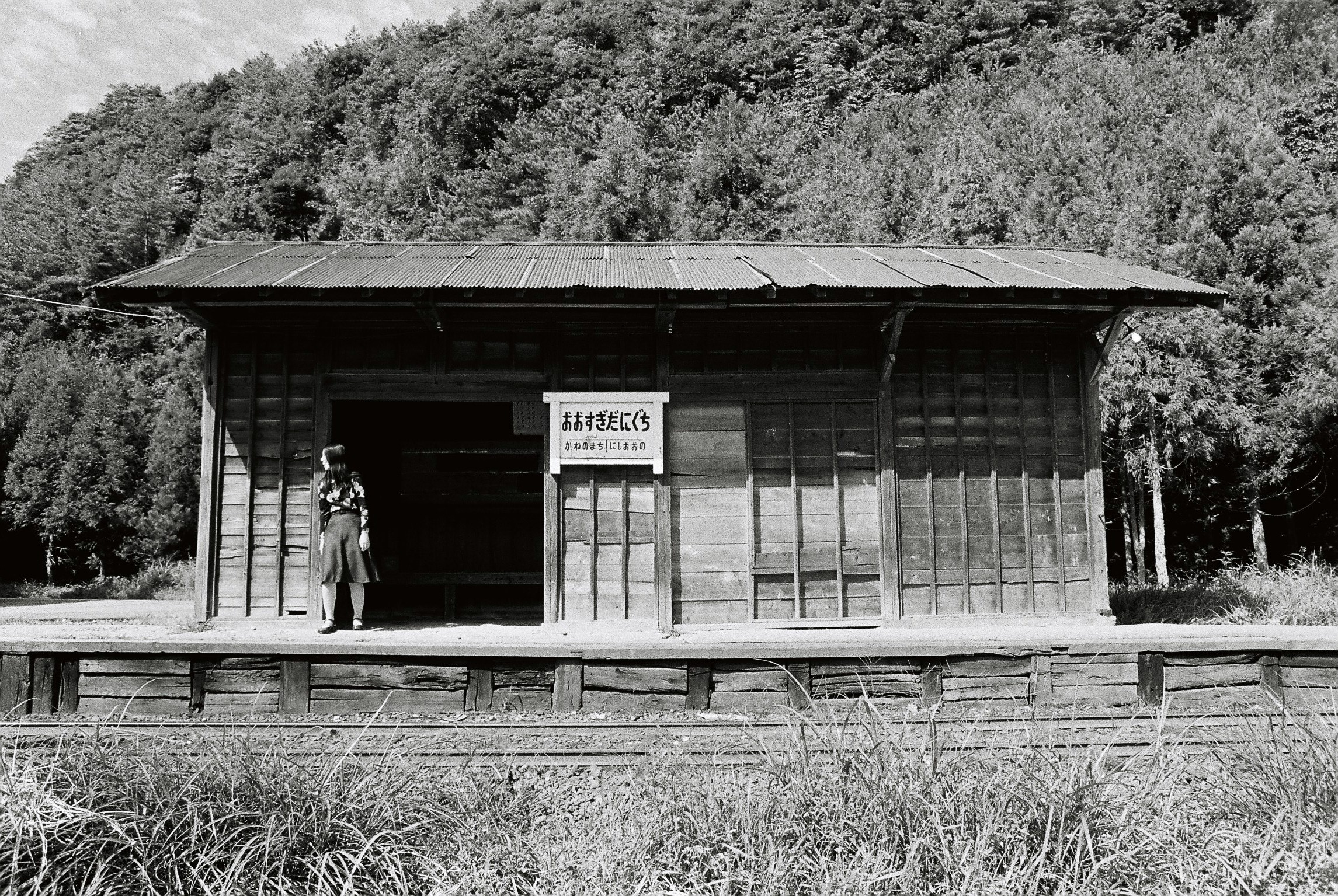 尾小屋鉄道大杉谷口駅